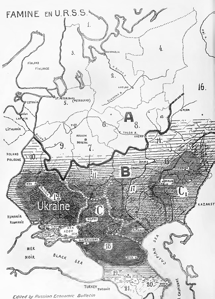 Suurim näljahäda mustaga tähistatud aladel. A – teravilja tarbiv piirkond, B – teravilja tootev piirkond, C ja C1– endiste kasakate piirkond.3.Karjala,7. Moskva oblast,10. Valgevene, 11. Kesk-Mustmulla oblast, 12. Ukraina, 13. Kesk-Volga oblast, 14. Tataria, 15. Bashkiria, 16. Uurali oblast, 17. Alam Volga oblast, 18. Põhja-Kaukaasia oblast, 19. Georgia, 20. Azerbaijan, 21. Armenia